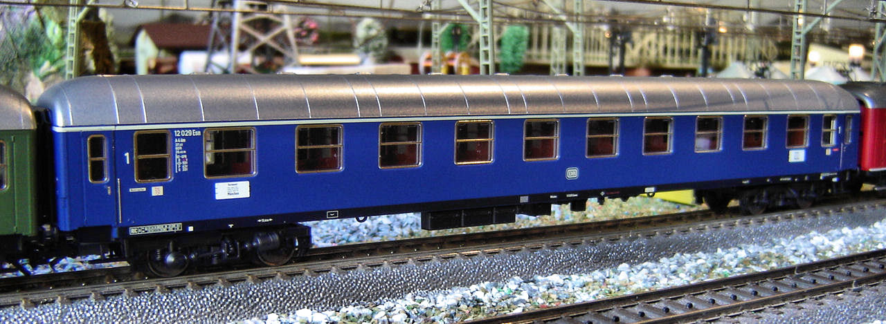 Märklin Personenwagen der Nenngrösse H0.